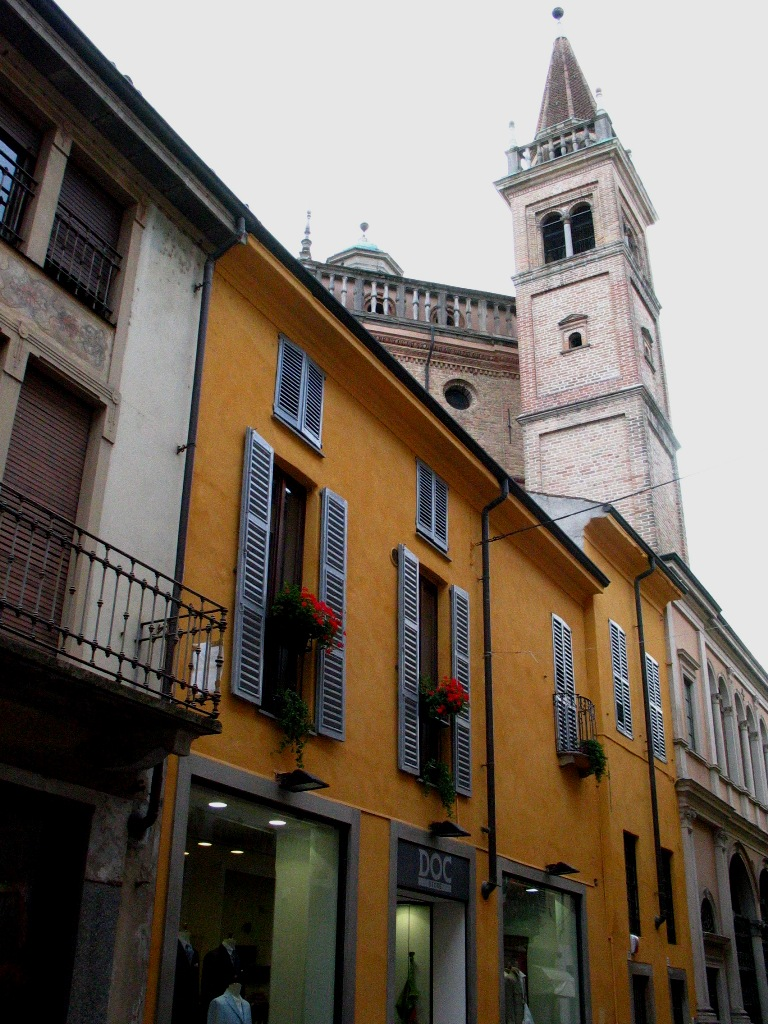 Lodi - Scorcio del Santuario dell'Incoronata.